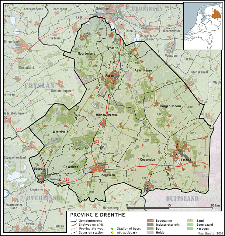 Provincie Drenthe, met indeling van gemeenten (2009) en impressie van het landschap. Door Jan-Willem van Aalst, samengesteld uit publiek beschikbare geo-data: Referentie-ondergrond (kustlijn, steden, wegen) gerasterd uit de OpenStreet Map OSM. ( Inhoud is beschikbaar onder de Creative Commons Attribution-ShareAlike 3.0 license. Referentie-ondergrond op water bewerkt vanuit Gebruik is vrij met bronvermelding NLR en ESA. Vectorgrenzen van gemeenten en regio's vrij ter beschikking gesteld met dank aan cartografen van brandweerregio's Hollands-Midden en IJsselland; gerasterd in Photoshop. Hoogte-aanduidingen (reliëf) gerasterd uit de AHN Viewer ( gebruik is vrij met bronvermelding (c) AHN, Overige kenmerken op de kaart: eigen tekenwerk van Jan-Willem van Aalst, op basis van gerasterde gemeentegrenzen.